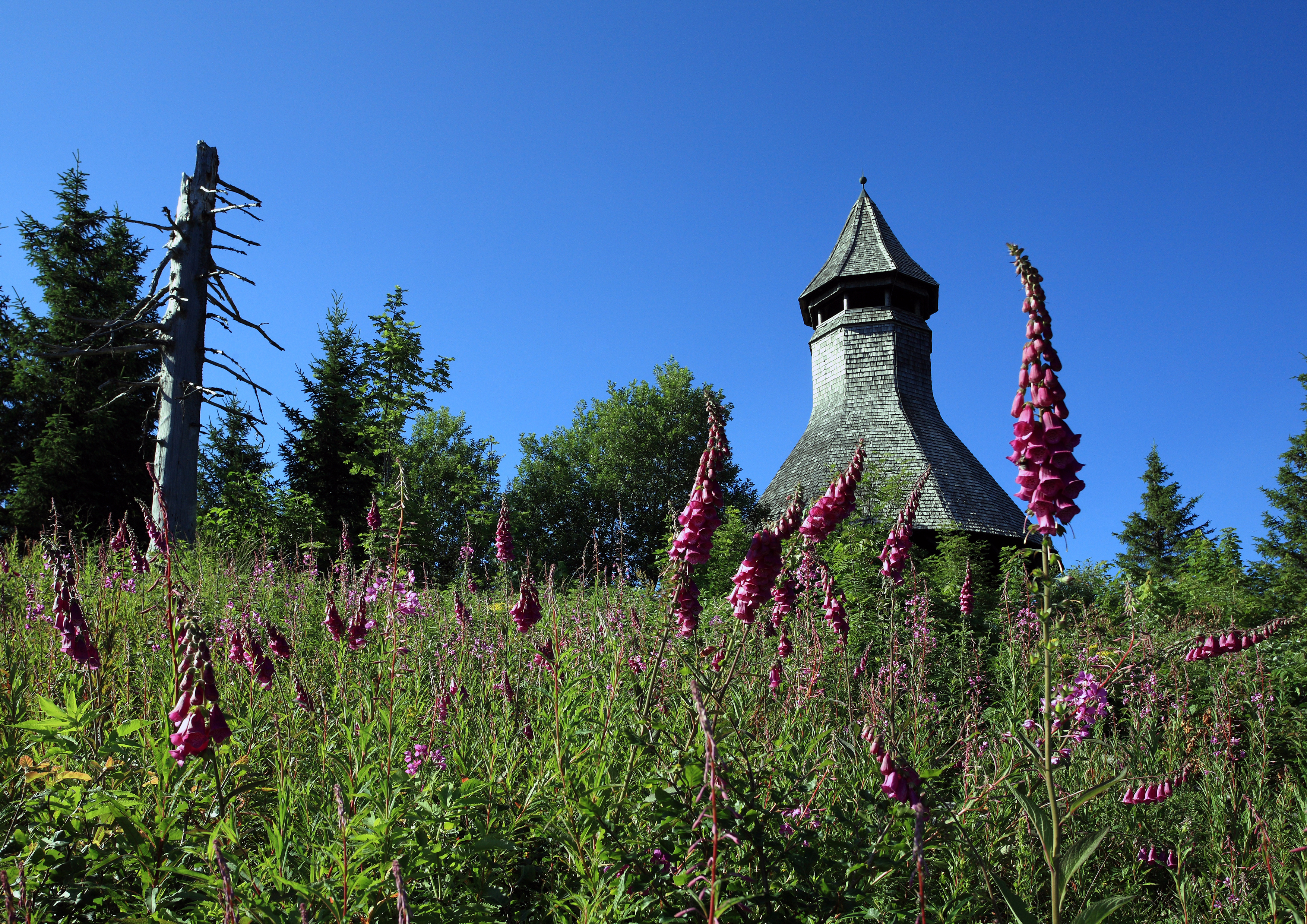 Hochkopfturm bei Todtmoos